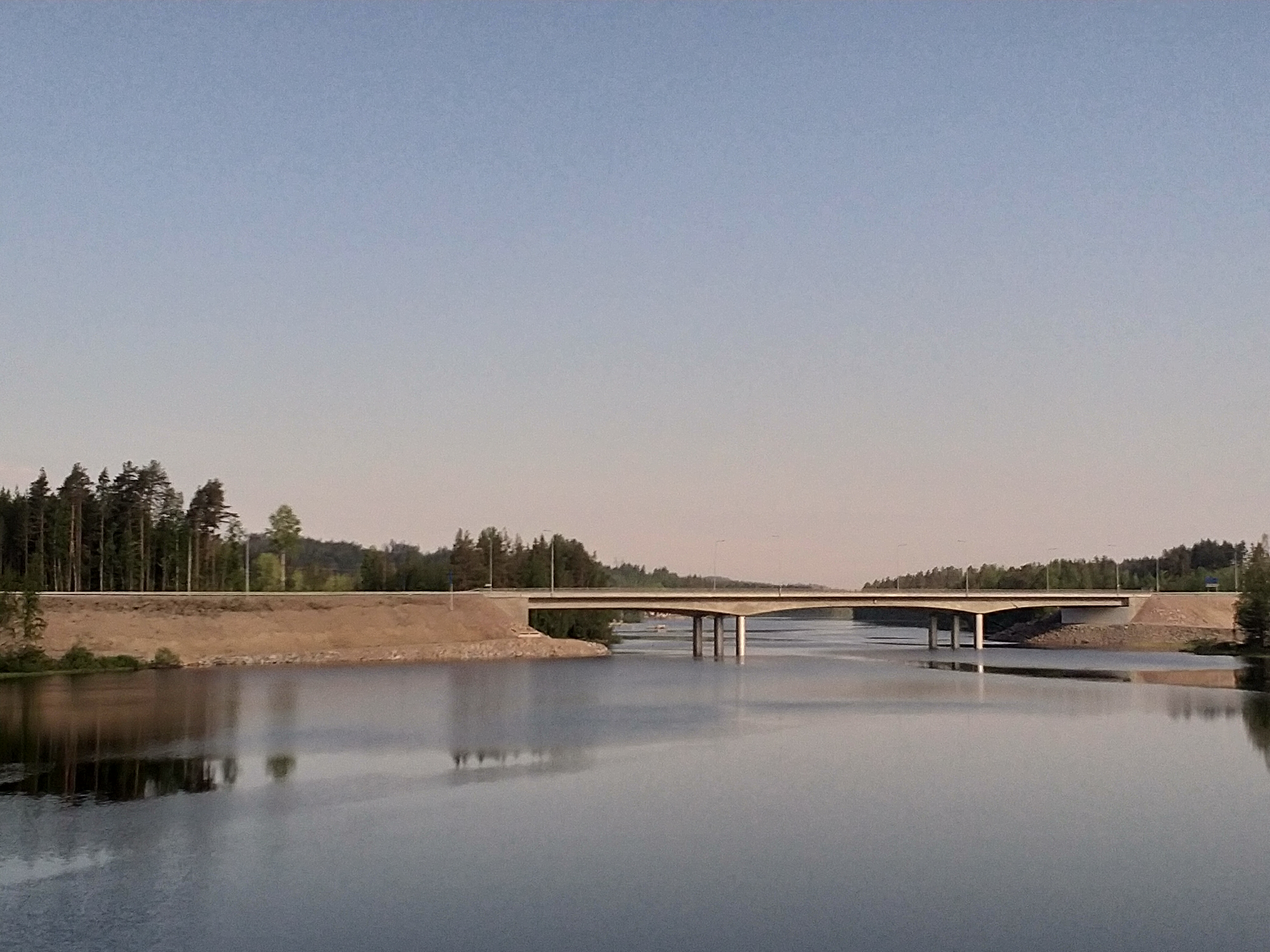 Äänekoski, uusi silta Kotakennäänsalmi